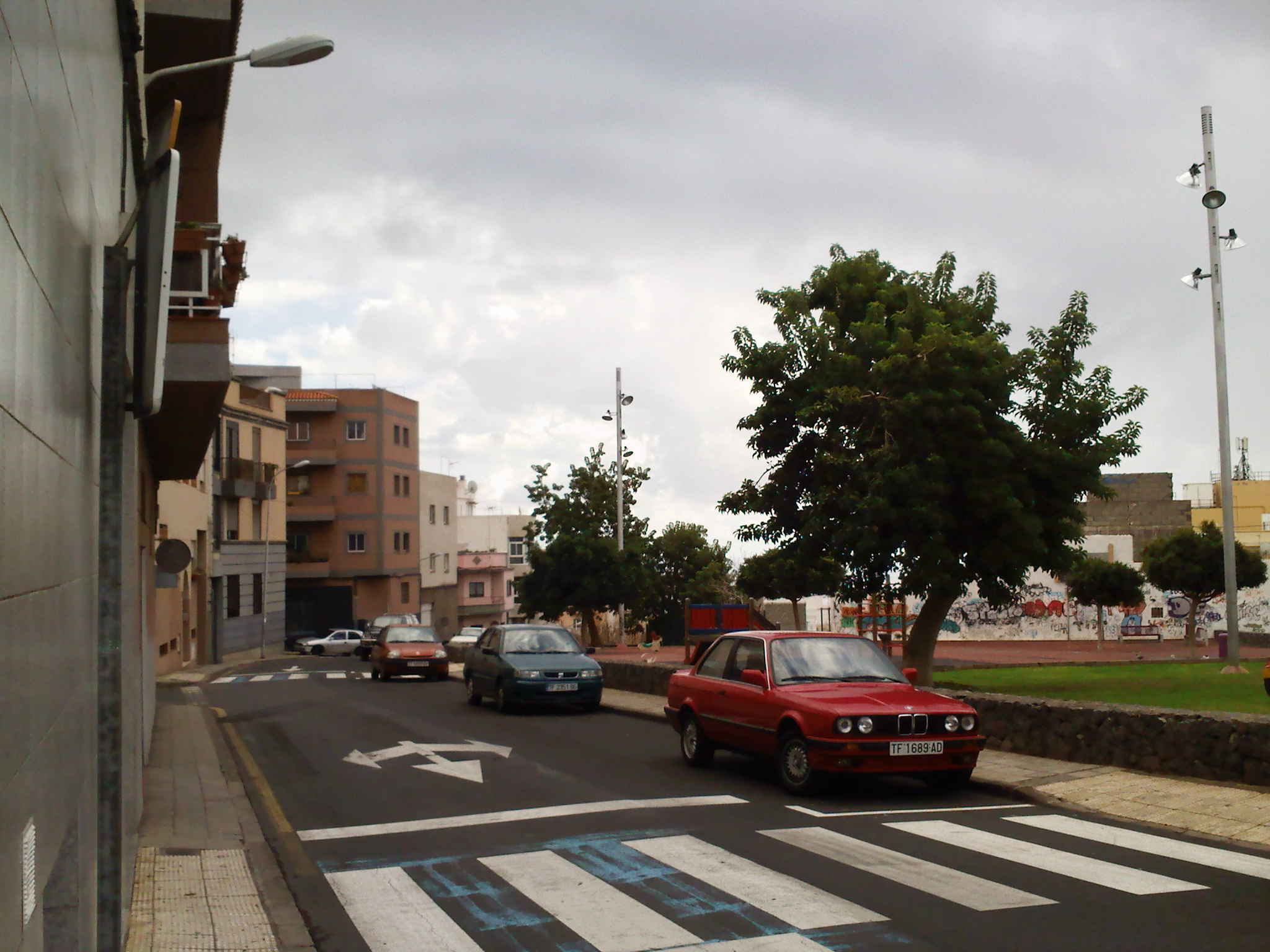 Barrio La Candelaria